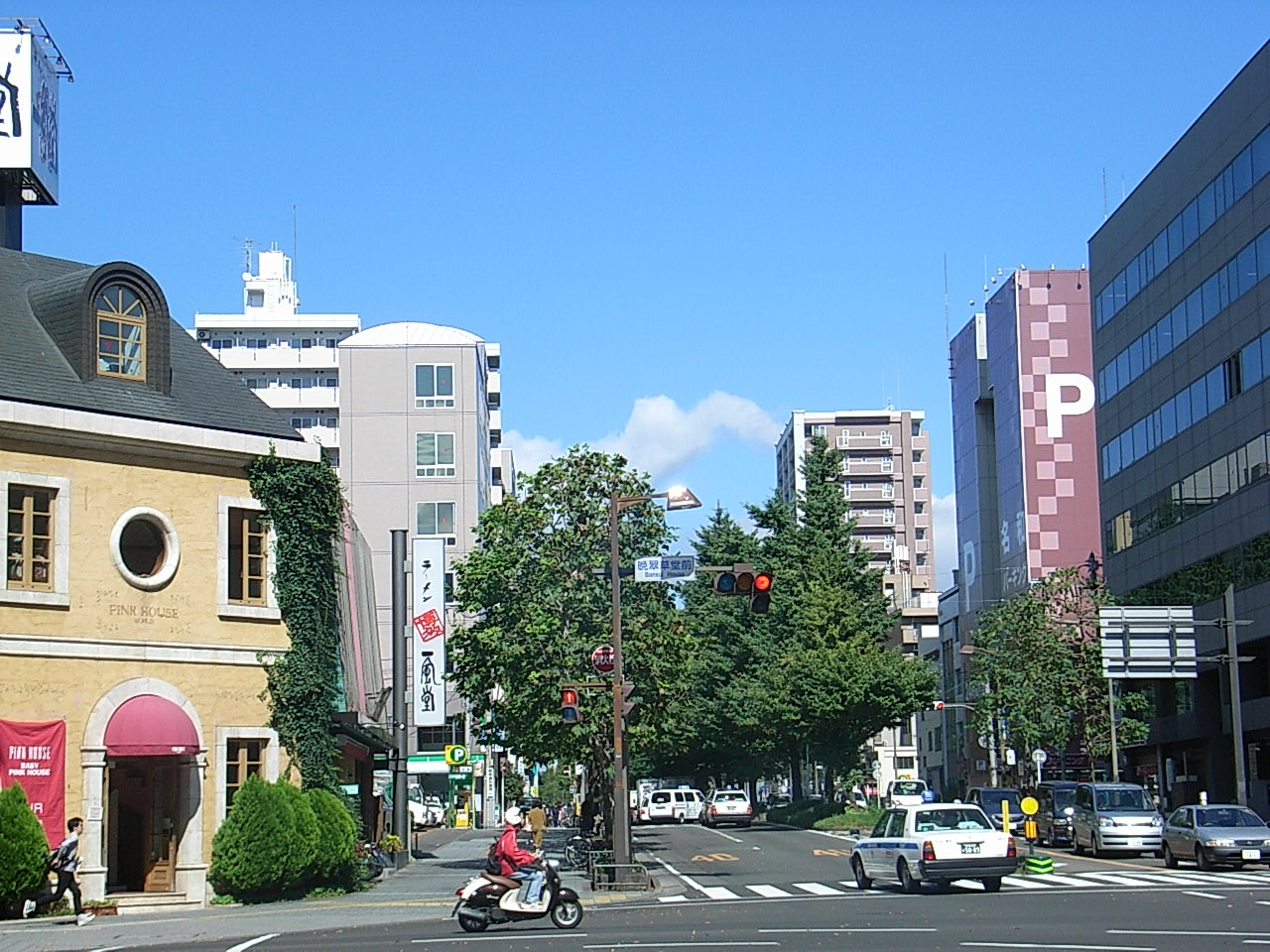 Bansui Avenue